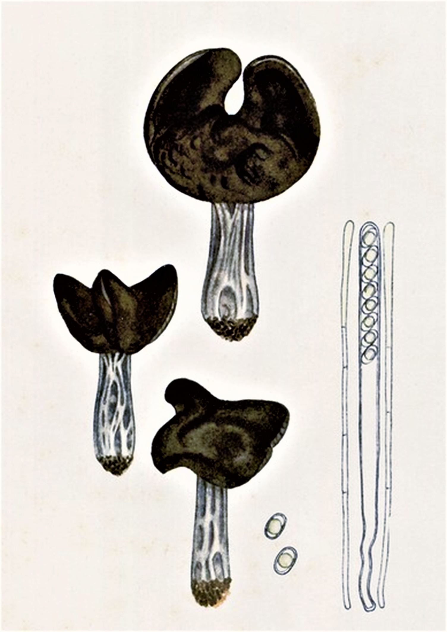 Giacomo Bresadola: Helvella lacunosa Afzel. (1783)